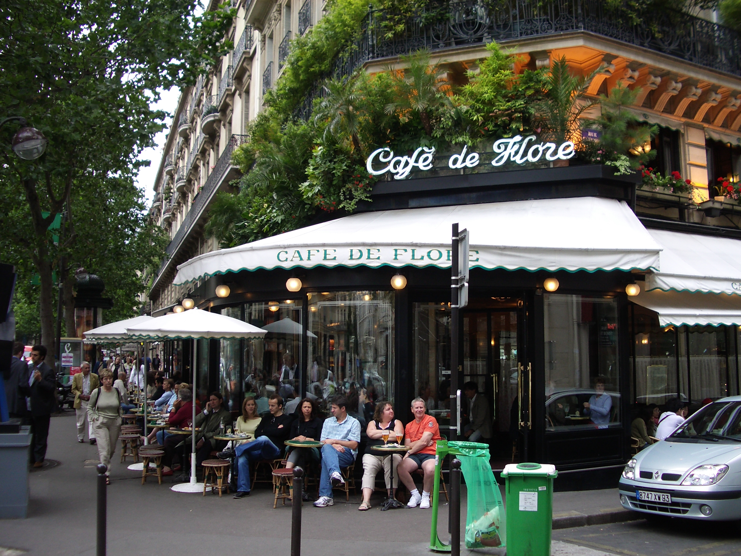 Famous café where Sartre, Simone de Bauvoir, Camus and Picasso used to eat. it is also the inspiration for the music compilation "Café de Flore - Rendez-vous à Saint-Germain-des-Prés".st-germain district: café de flore